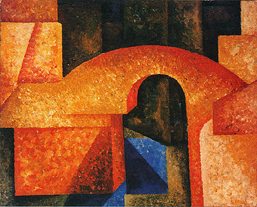 Ponte